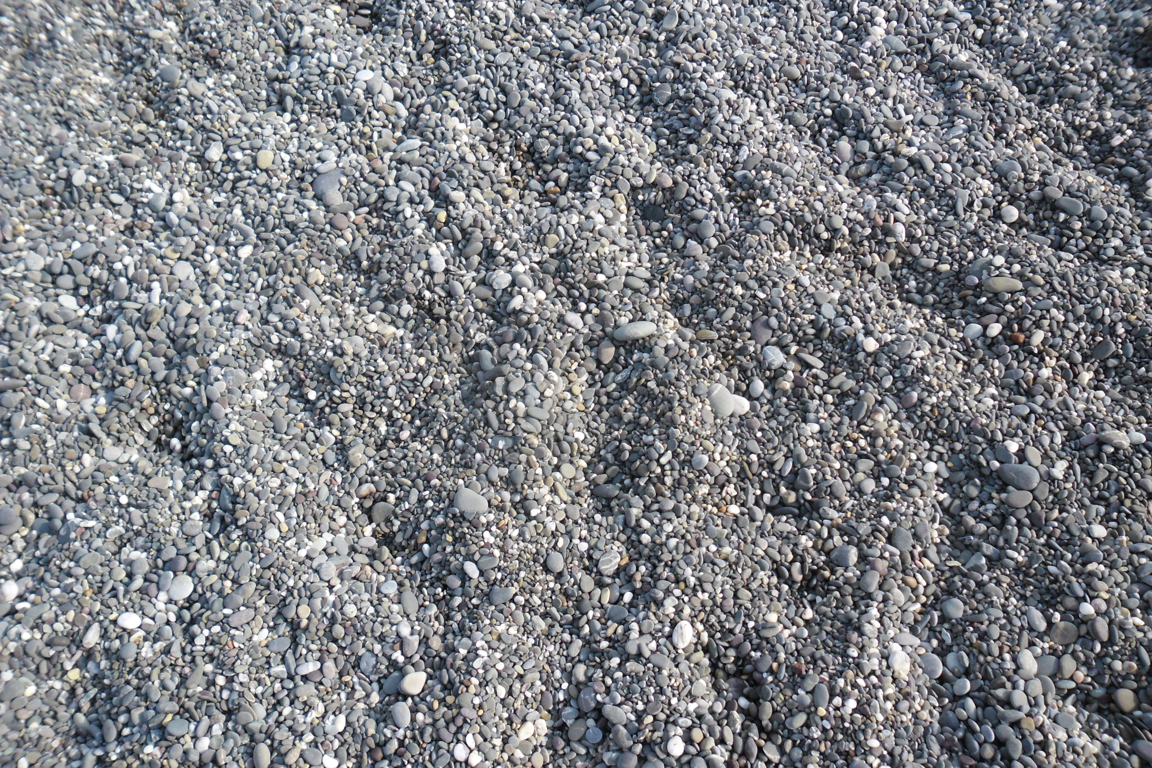 Фото дрібної гальки